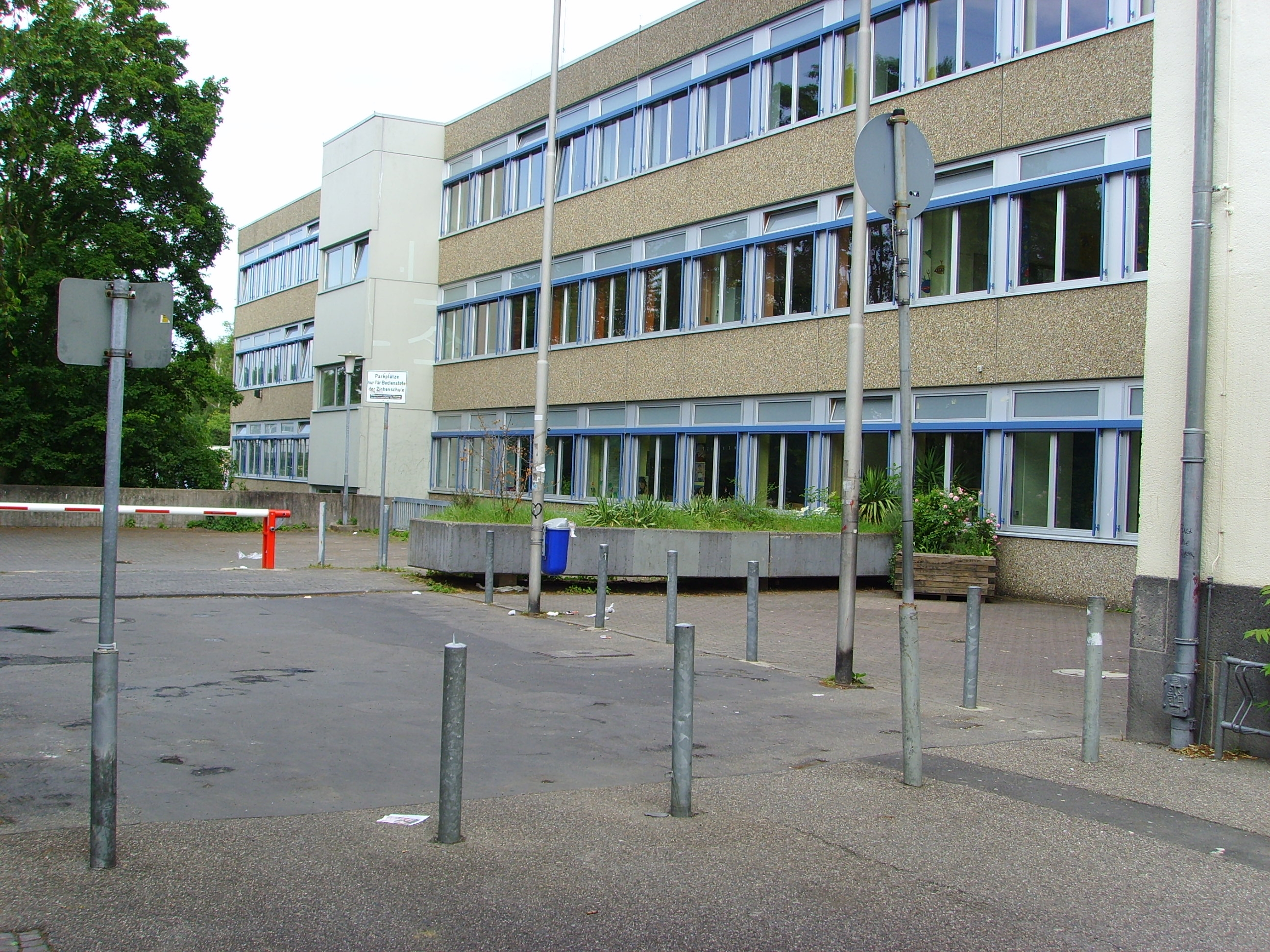 Ziehenschule in Frankfurt am Main, Neubau